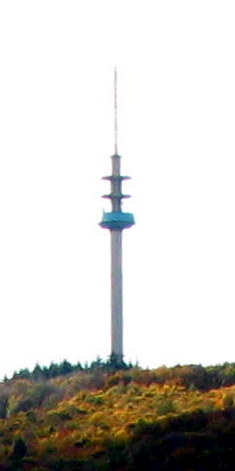 Der Fernmeldeturm auf dem Bornberg bei Eßweiler im Nordpfälzer Bergland